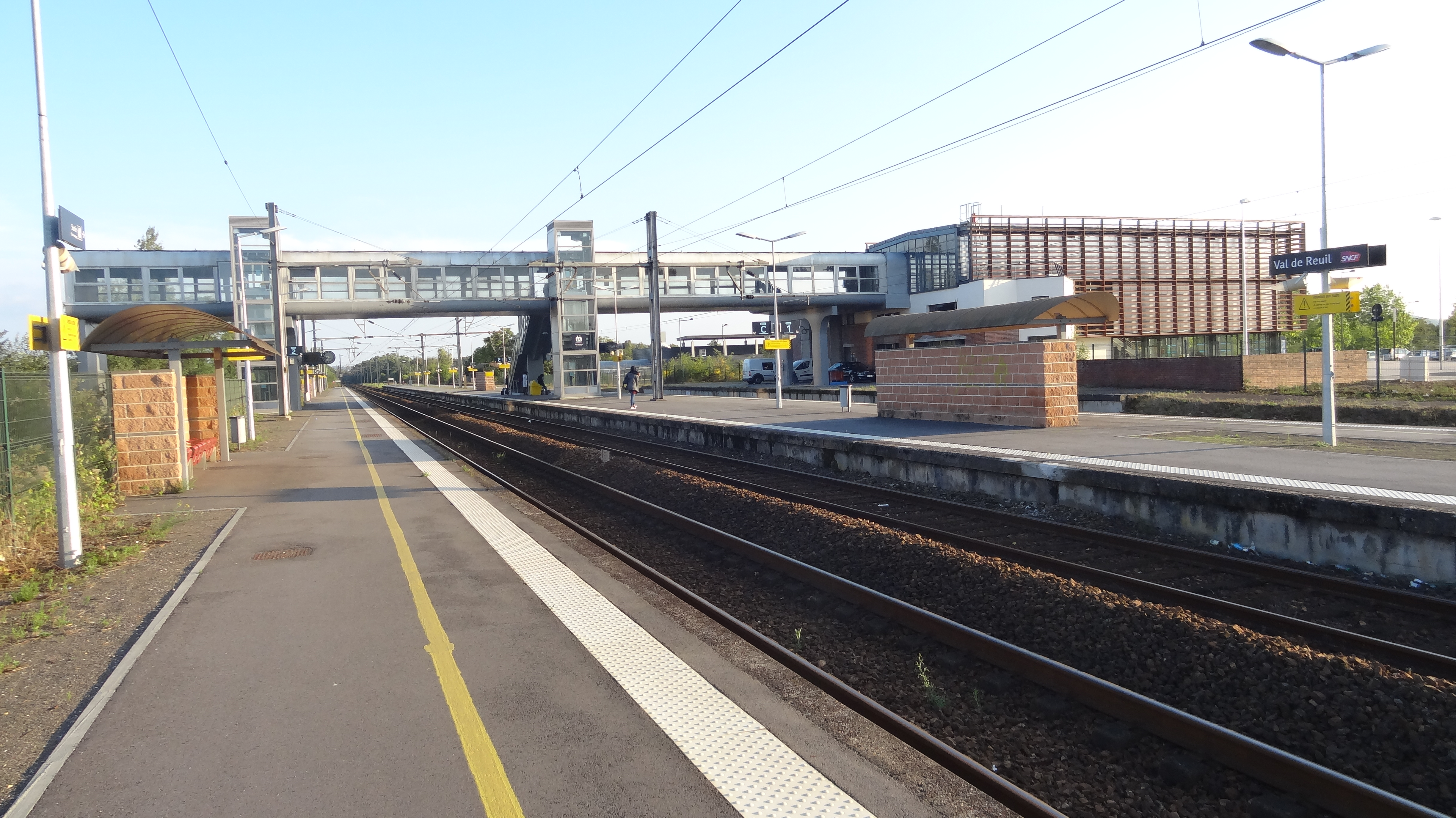 Quais de la gare de Val-de-Reuil, département de l'Eure, France.